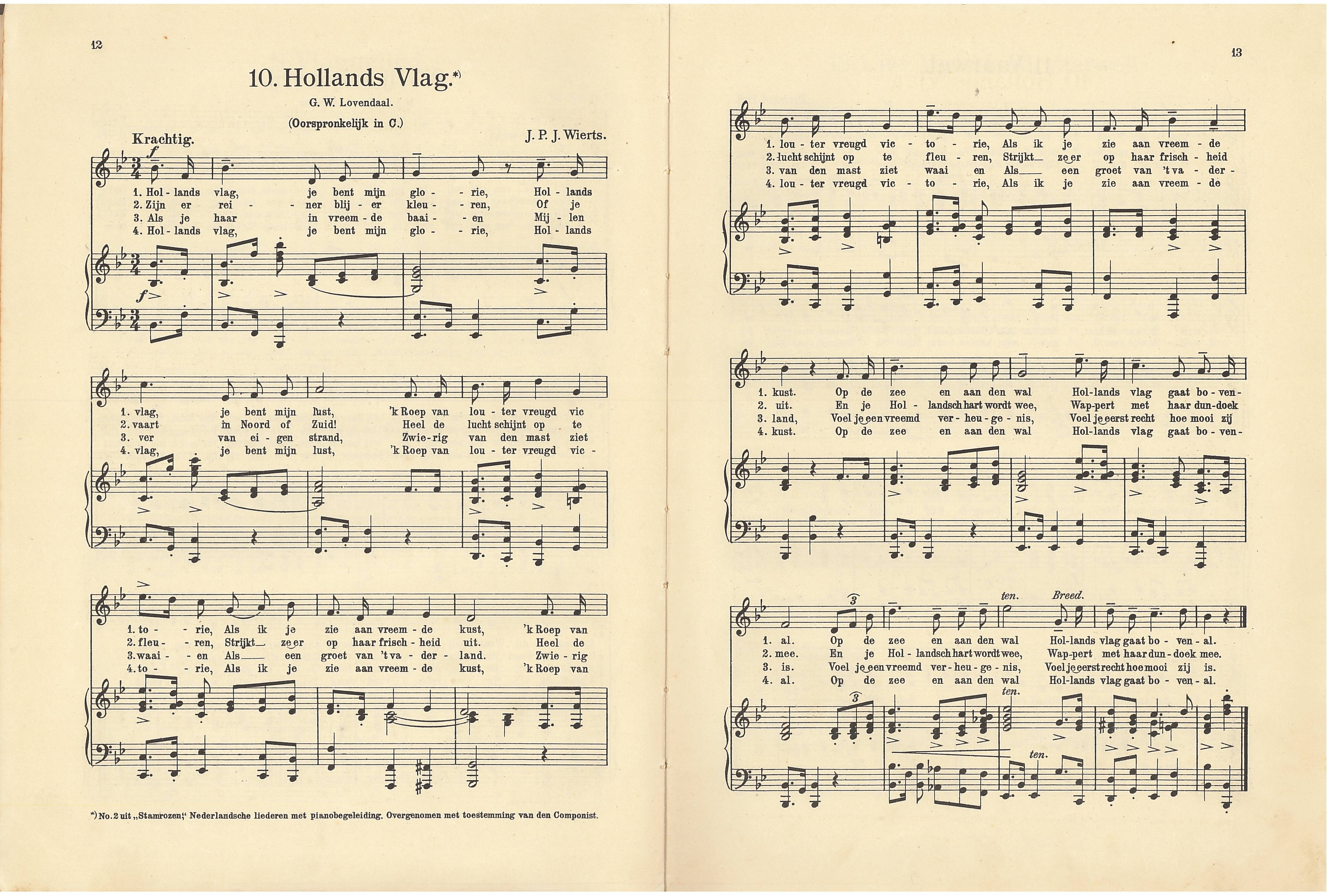 Kun je nog zingen, zing dan mee. Muziek en teksten origineel gepubliceerd voor 1900.